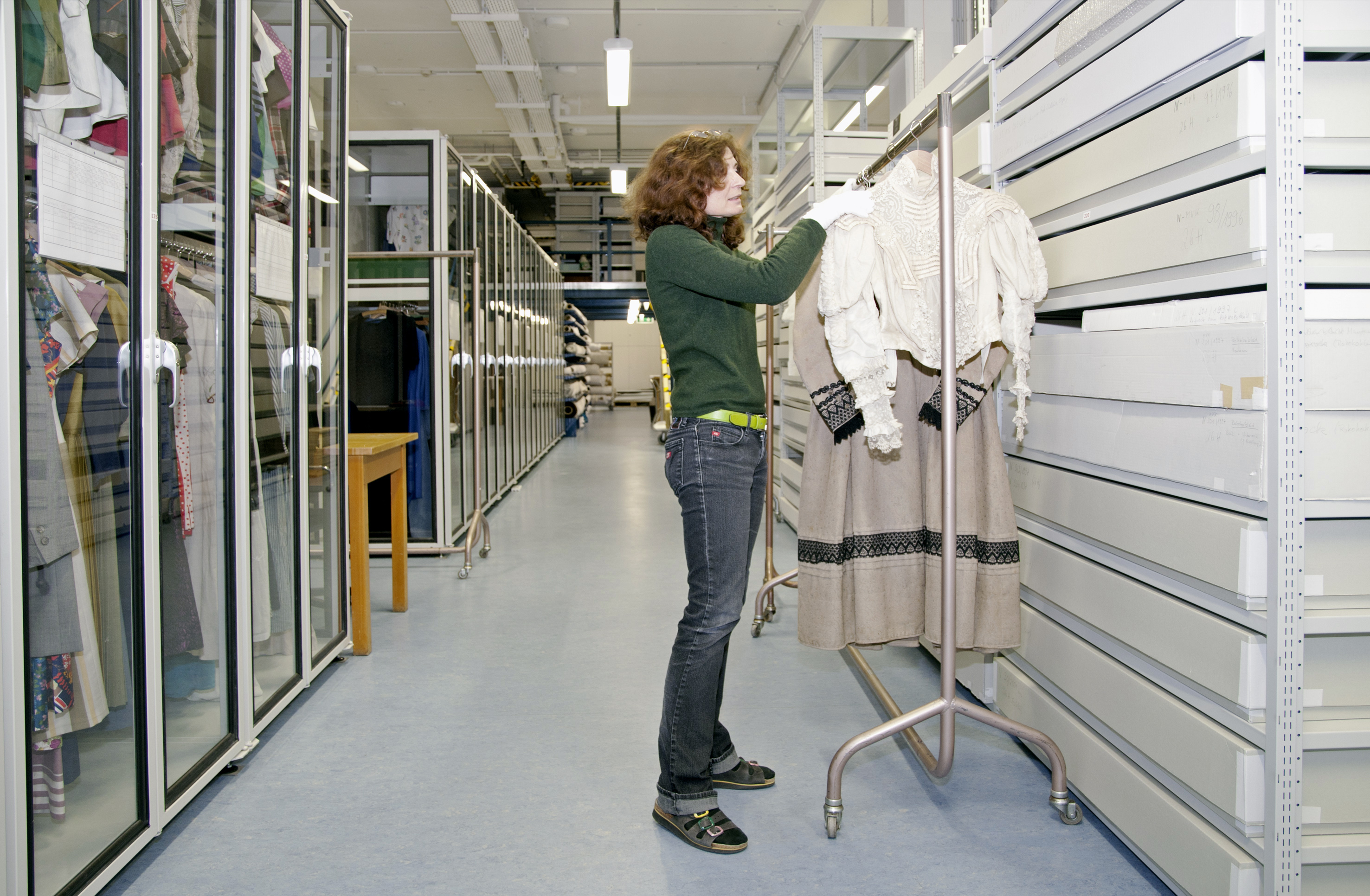 Restauratorin bei der Arbeit im Textildepot